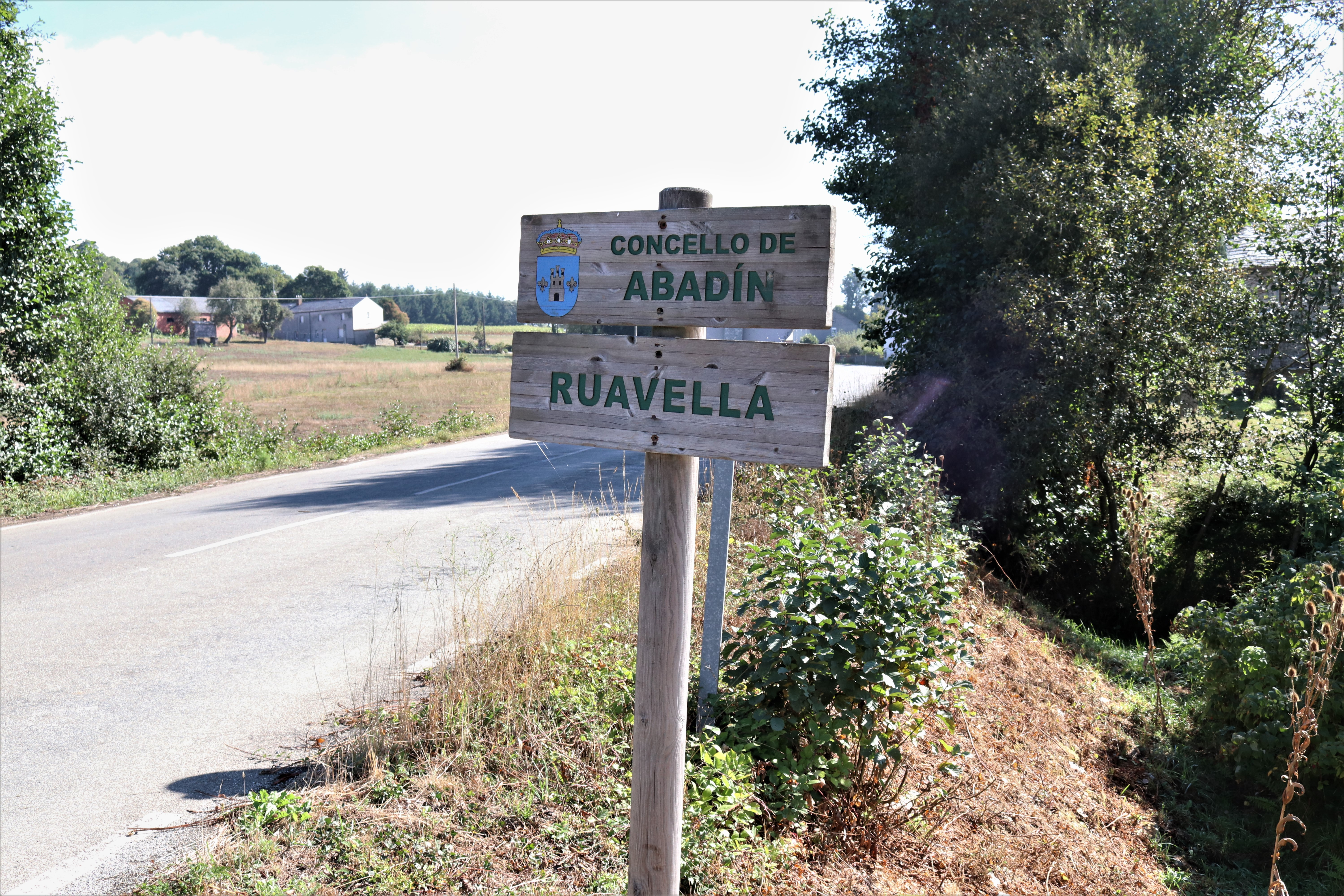 Lugar de Ruavella, A Graña de Vilarente, Abadín.